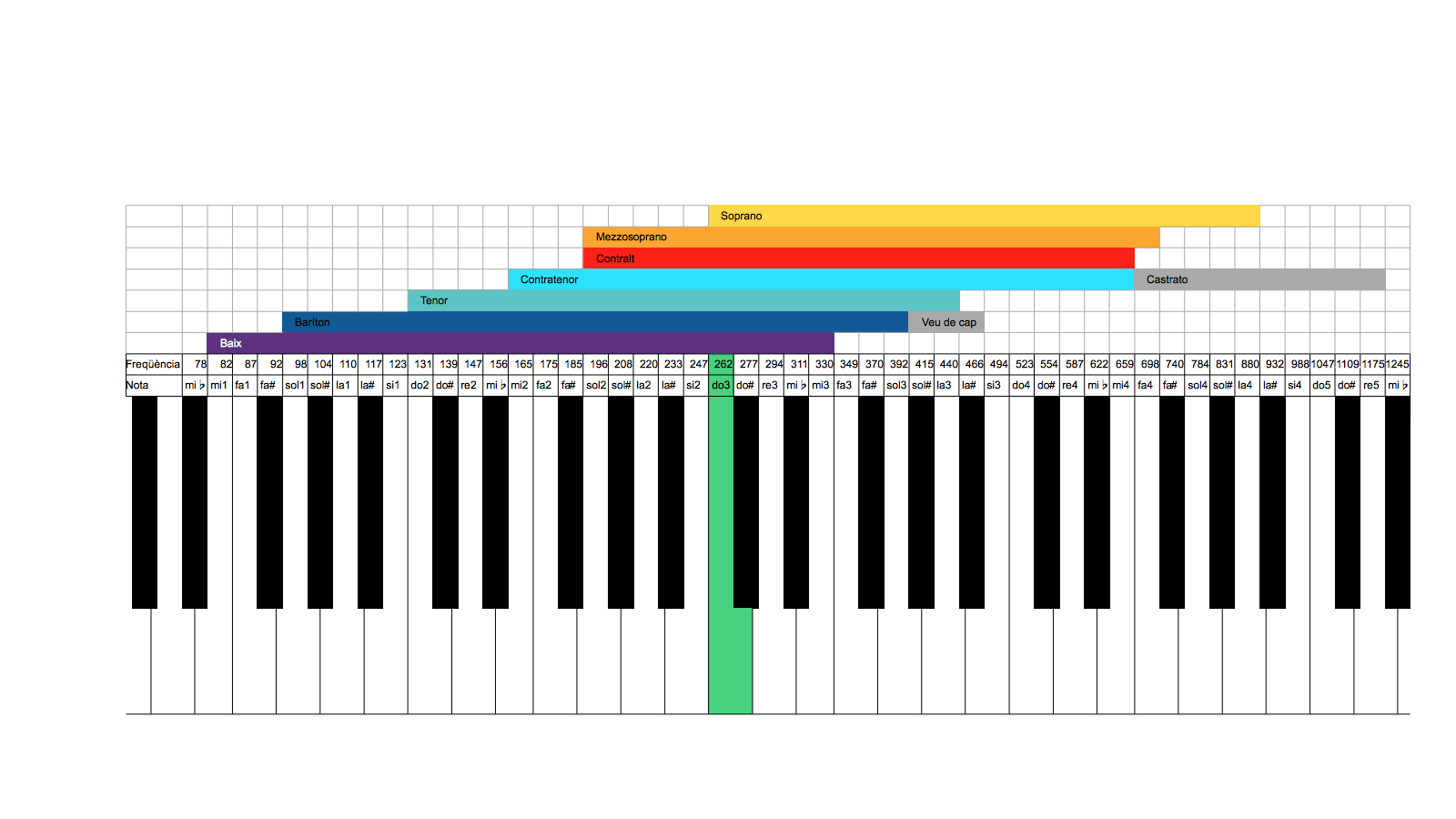 Tessitures més habituals dels diferents registres vocals cotejats amb el teclat del piano. Les denominacions de les notes responen al sistema de notació franco-belga.